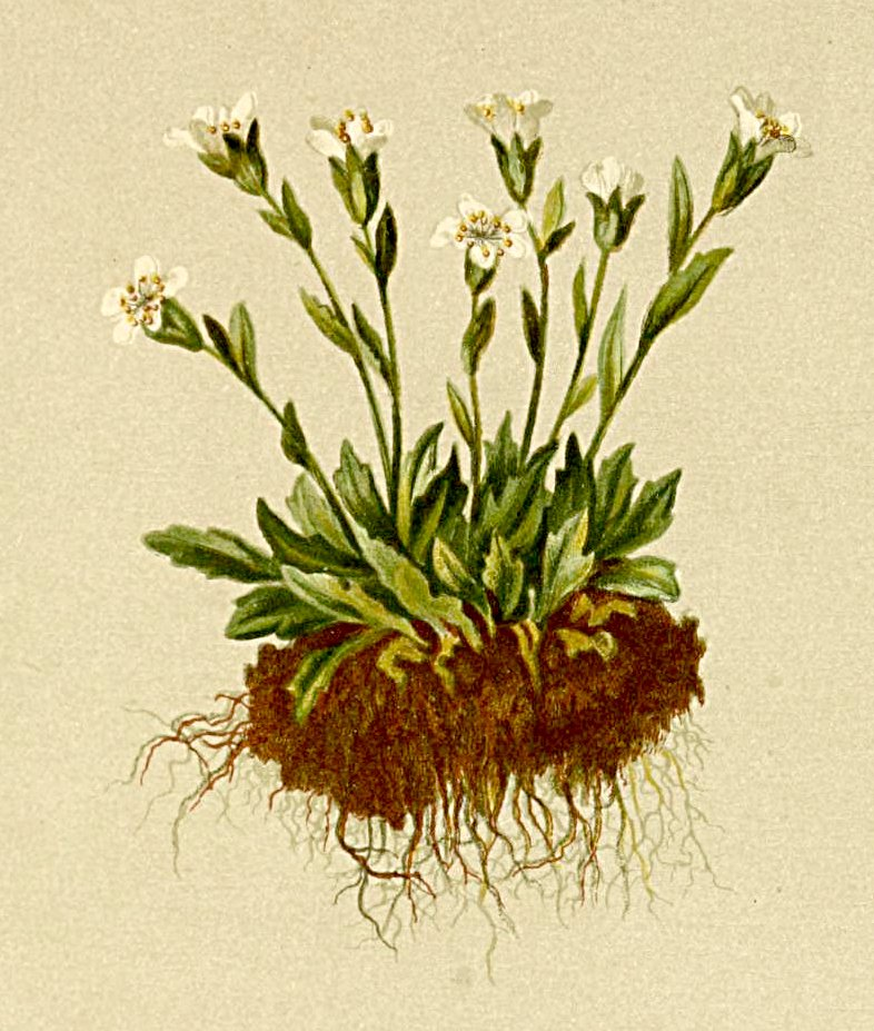 Saxifraga controversa (Saxifraga adscendens)